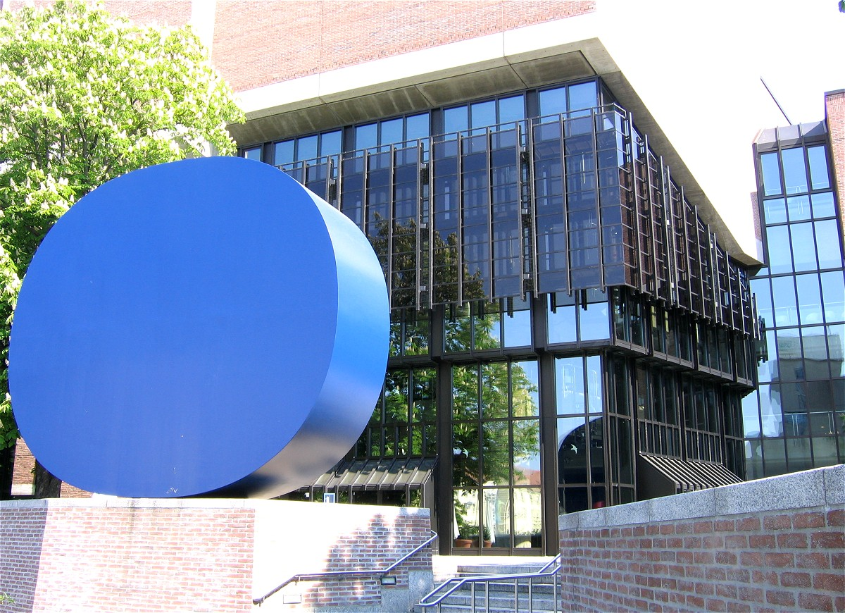 Kulturzentrum Gasteig in München, Gerundetes Blau, Aluminium spritzlackiert, Rupprecht Geiger (1987)